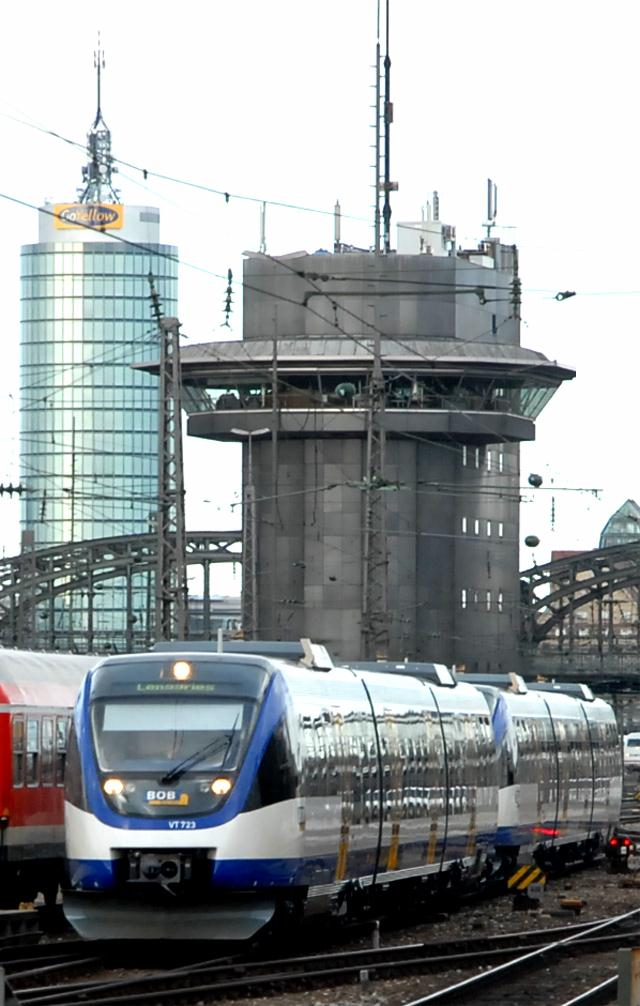 Bayerische Oberlandbahn VT 725 + VT 720 op 4 maart 2007 te München Hbf